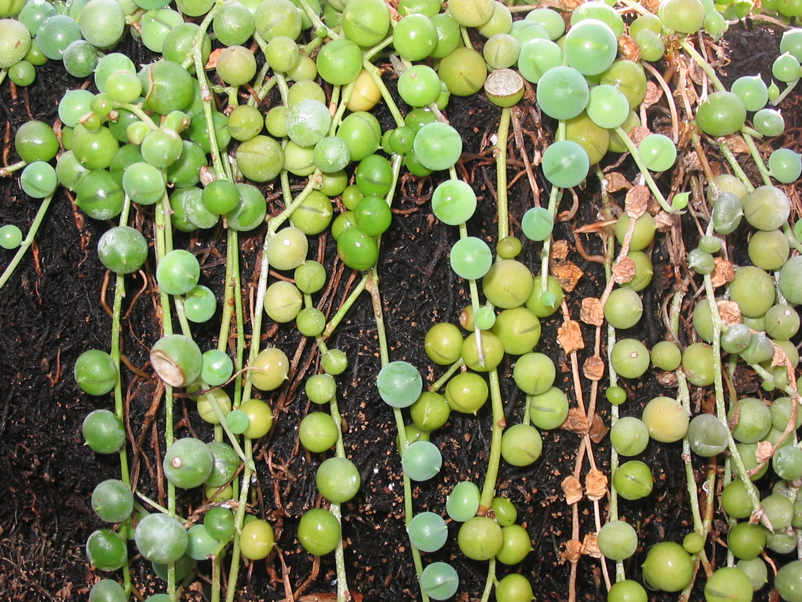 Pablo Alberto Salguero Quiles